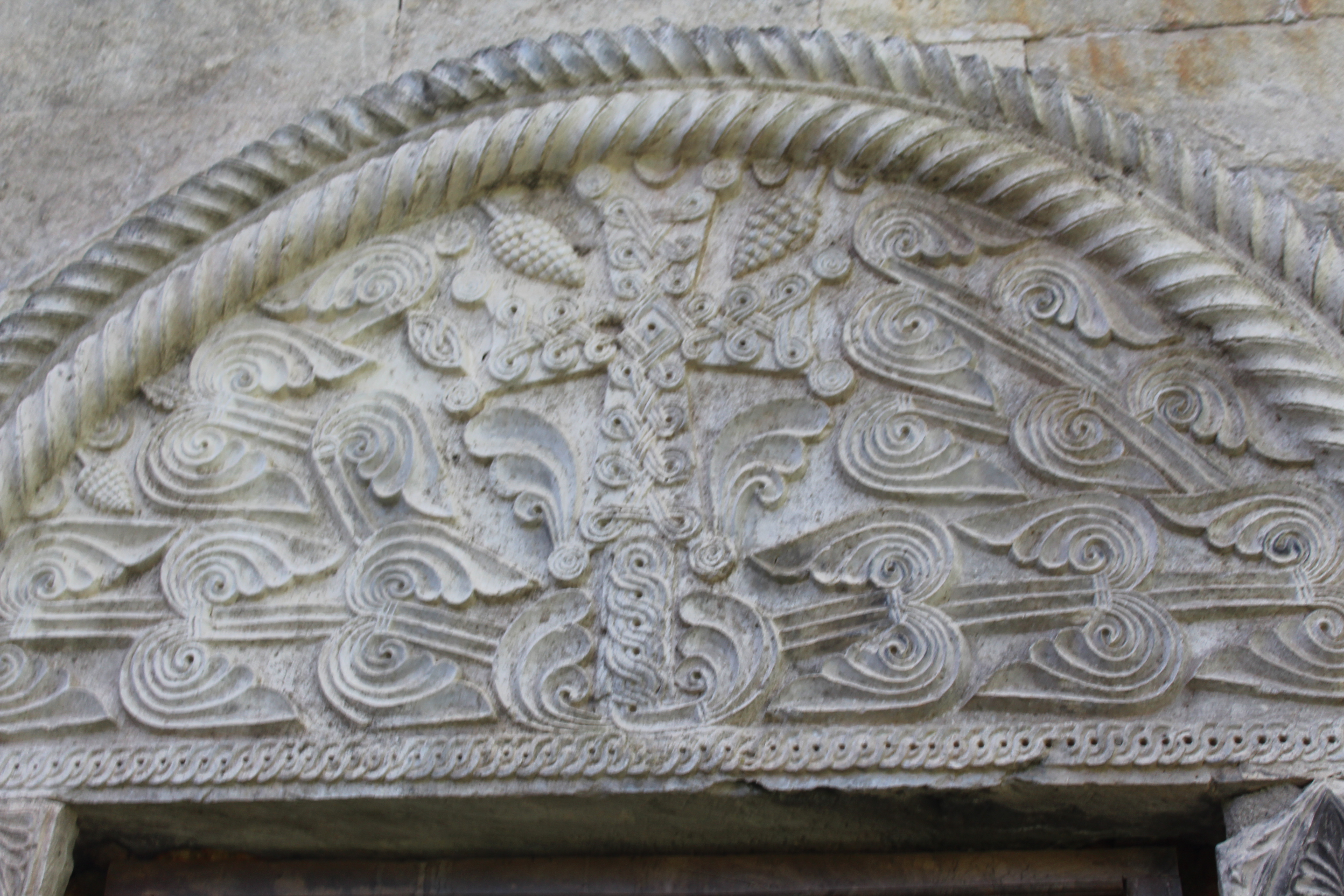 ეხვევის ღვთისმშობლის ეკლესია, XI საუკუნის დამდეგი.